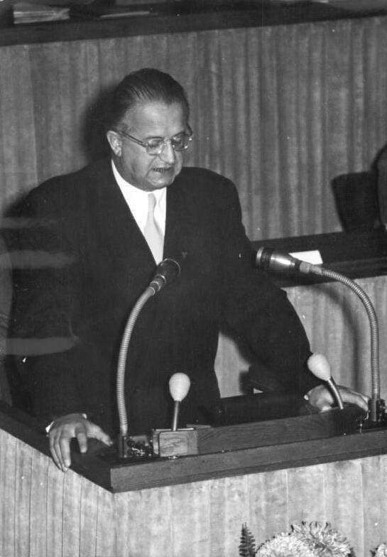 Illus/Quaschinsky 1.11.51 13. und 14. Sitzung der Volkskammer Die Volkskammer der DDR trat am 31.10.51 und 1.11.51 zu ihrer 13. und 14. Sitzung zusammen, um u.a. über das "Gesetz über den Fünfjahresplan zur Entwicklung der Volkswirtschaft der Deutschen Demokratischen Republik", den Rechenschaftsbericht der Regierung über die Einnahmen der Republik und ihre Verwendung für das Rechnungsjahr 1950" und das "Gesetz über die Deutsche Notenbank" zu beraten. UBz: Dr. Liebler sprach für die LPD."